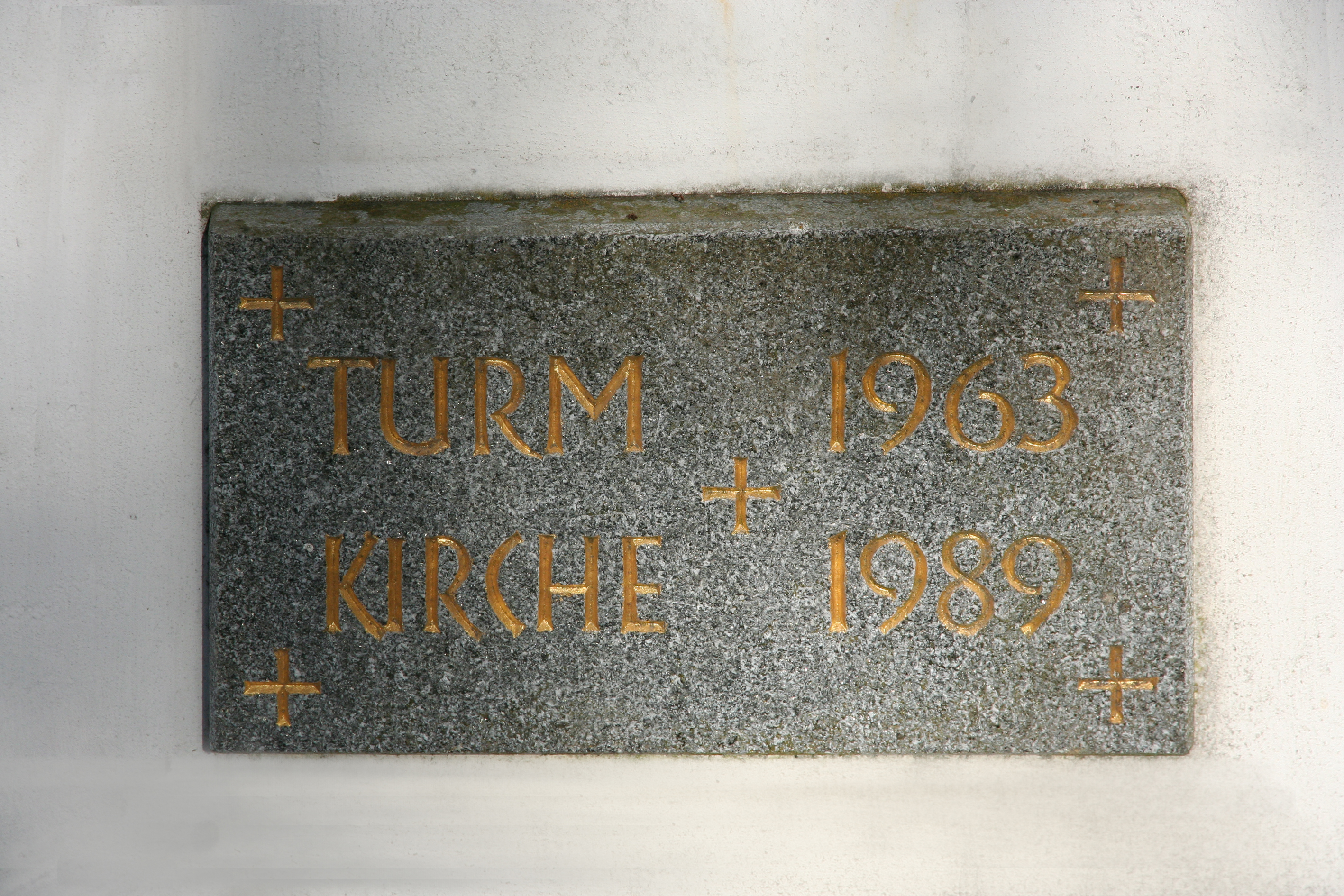 Römisch-katholische Kirche St. Plazidus und Sigisbert Kleinandelfingen, Grundstein